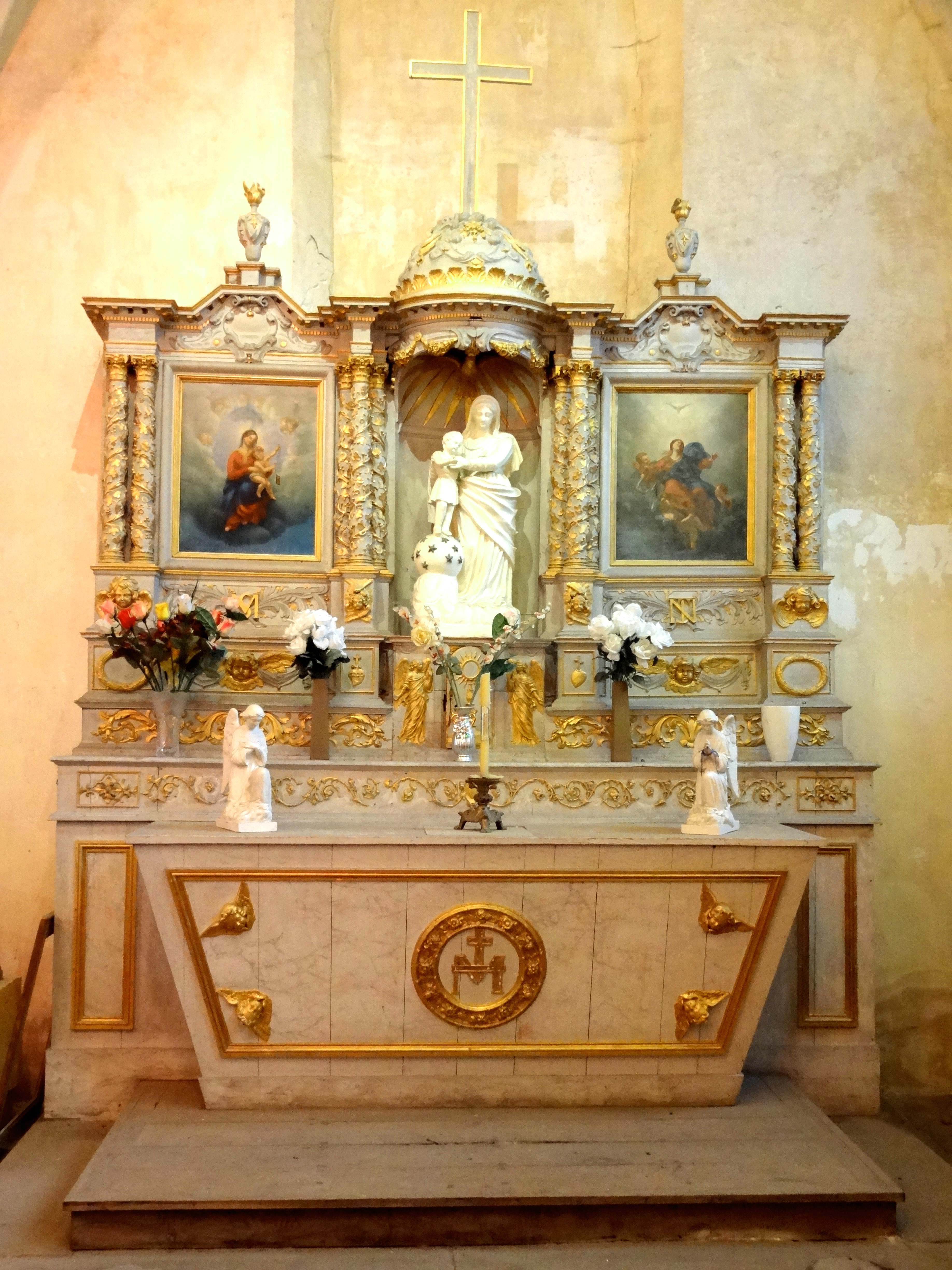 Mobilier de l'église - voir titre.